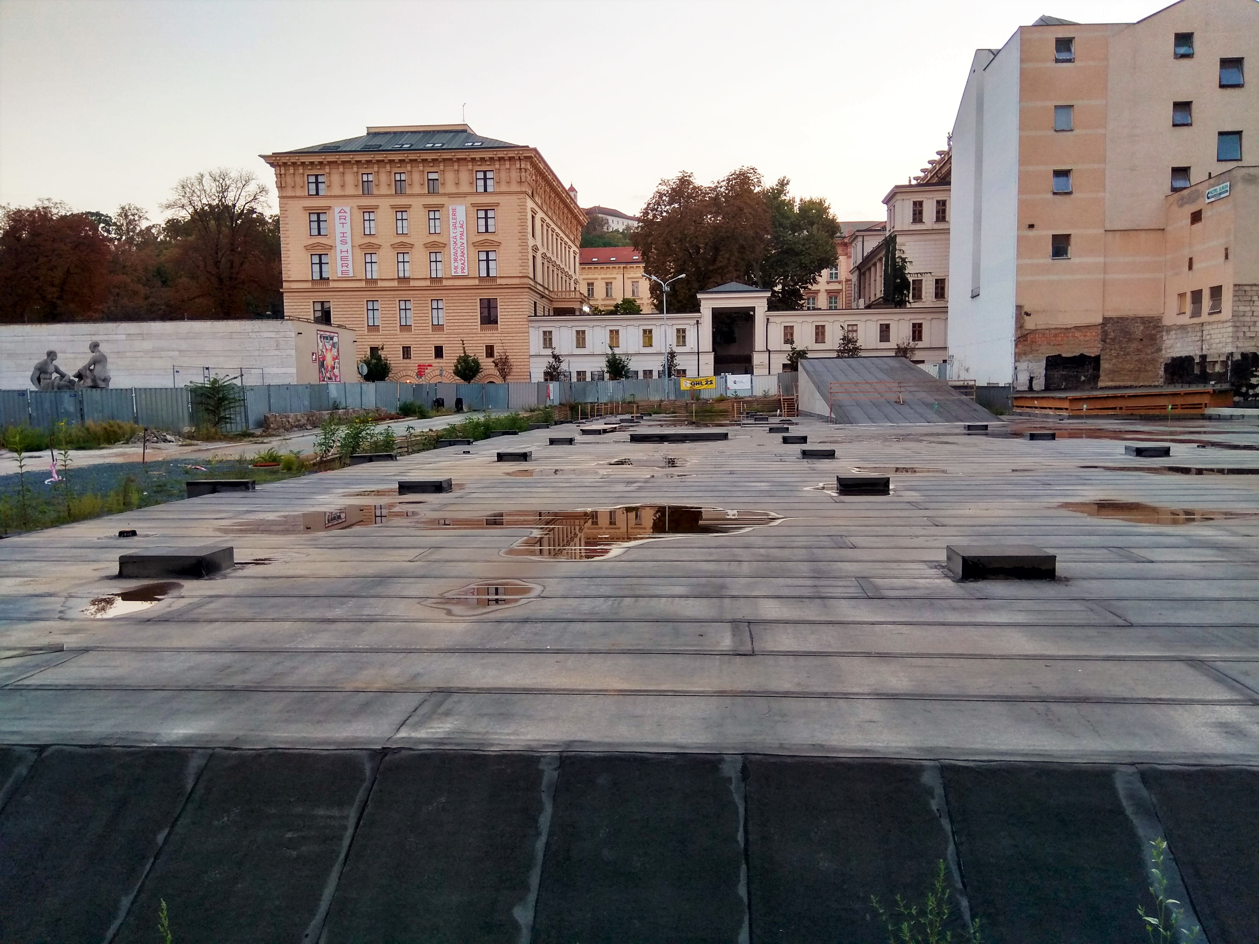 Stavba podzemních garáží na ulicích Besední a Veselá v Brně-střed, označená za 1. etapu výstavby Janáčkova kulturního centra Brno. Stav v září 2018 s již dočasně zastřešenou stavbou, pohled z Veselé ulice směrem k západu.